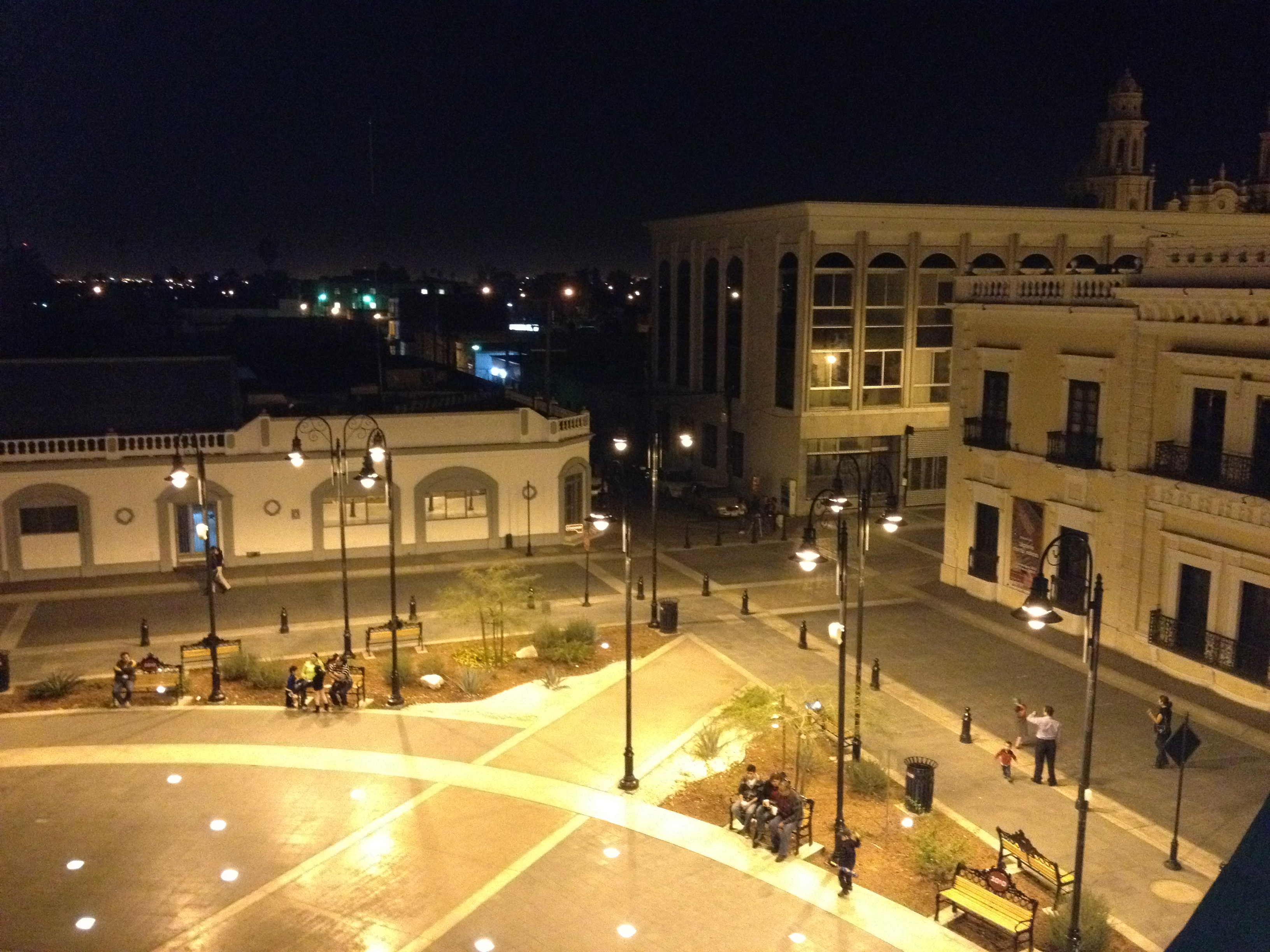 Plaza Bicentenario de noche, Hermosillo, México.